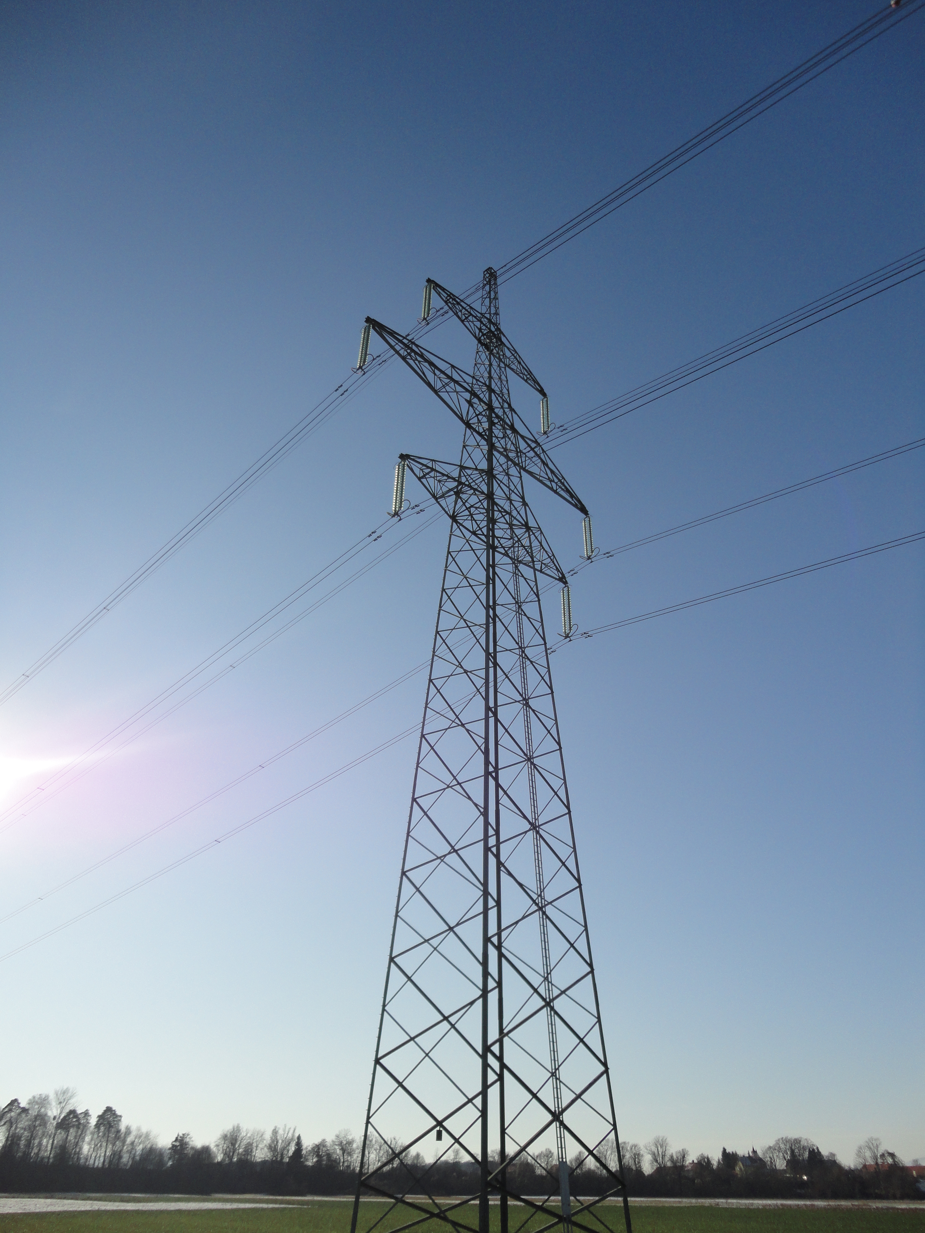 Visoka napetost na daljnovodih v bližini HE Zlatoličje.